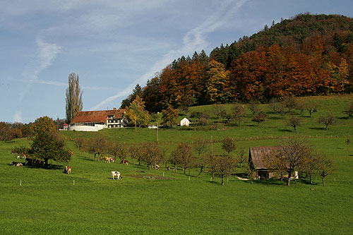 Bauernhof in Bretzwil